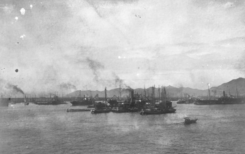 China, Tsingtau um 1912